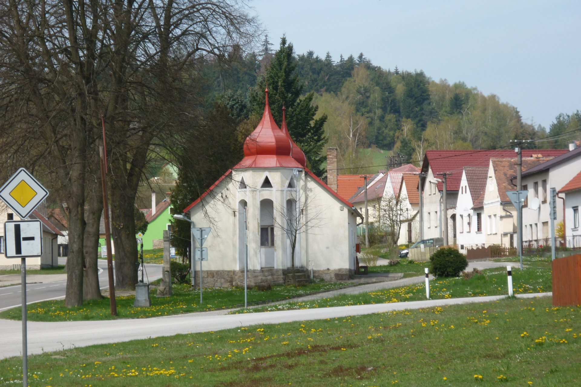 Markvarec, náves